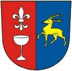 znak obce